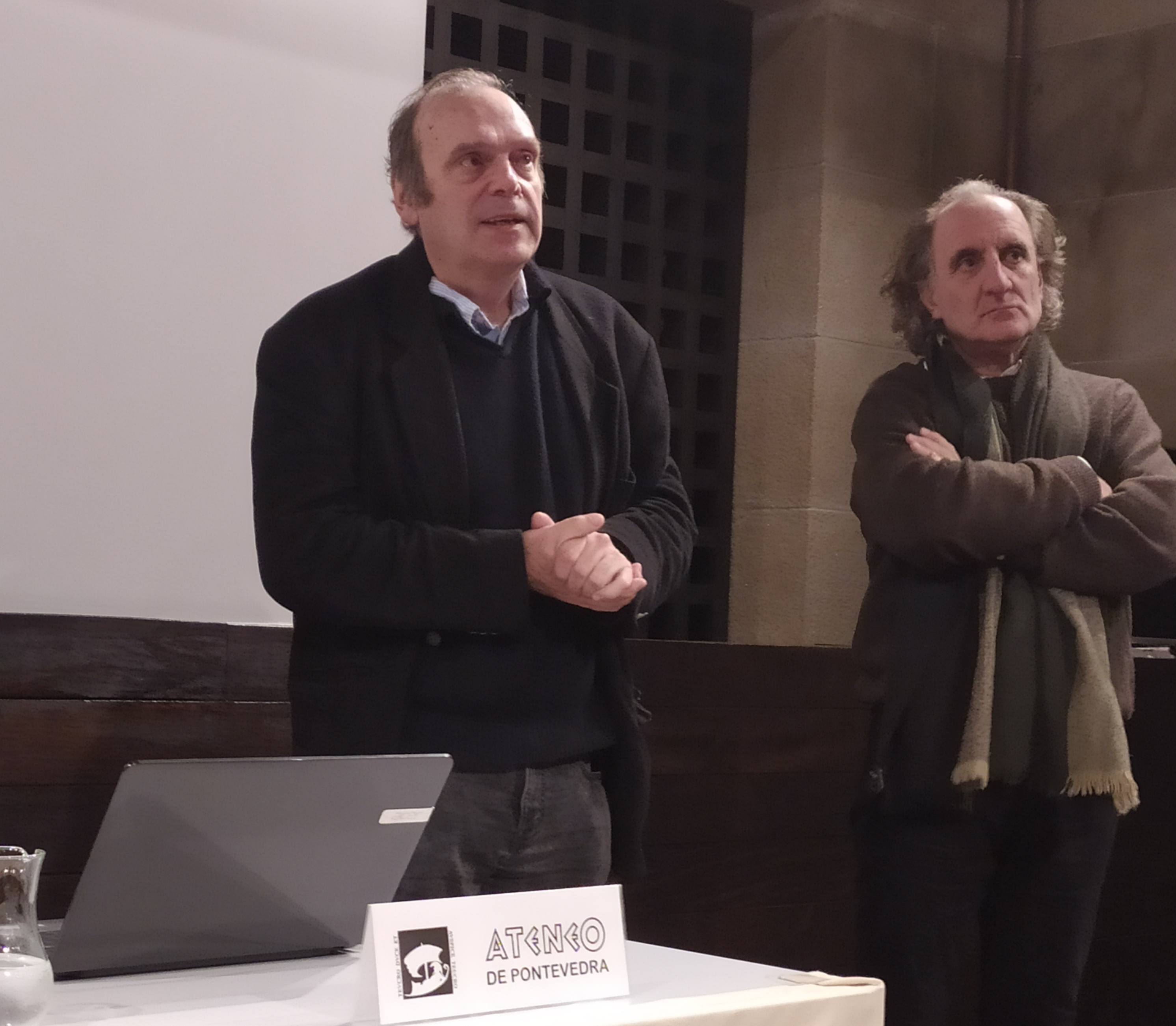 Manuel Forcadela e Xaime Toxo, escritores galegos, na Casa das Campás de Pontevedra